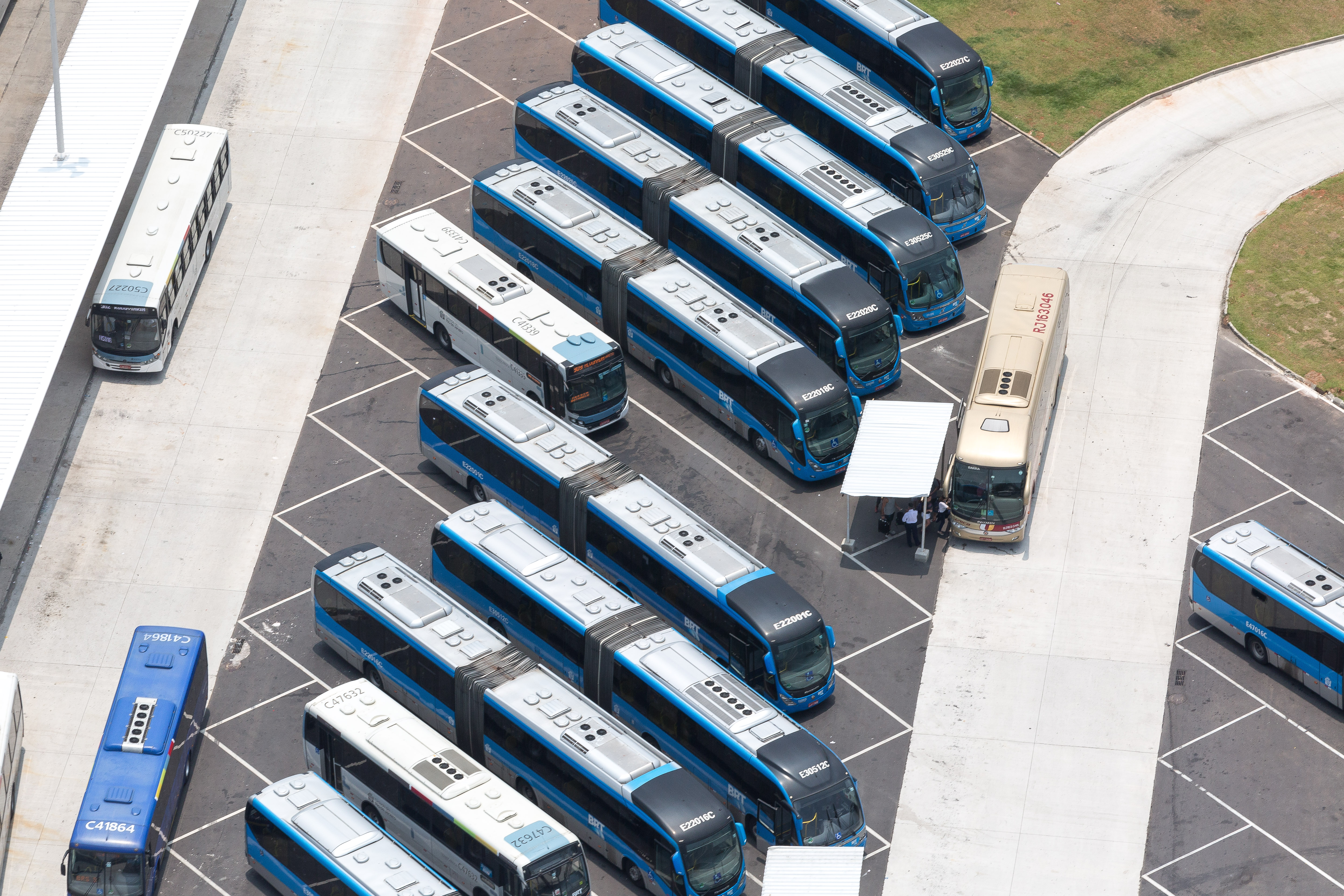 Vista aérea do estacionamento de ônibus BRT, na Barra da Tijuca, localizado na cidade do Rio de Janeiro.